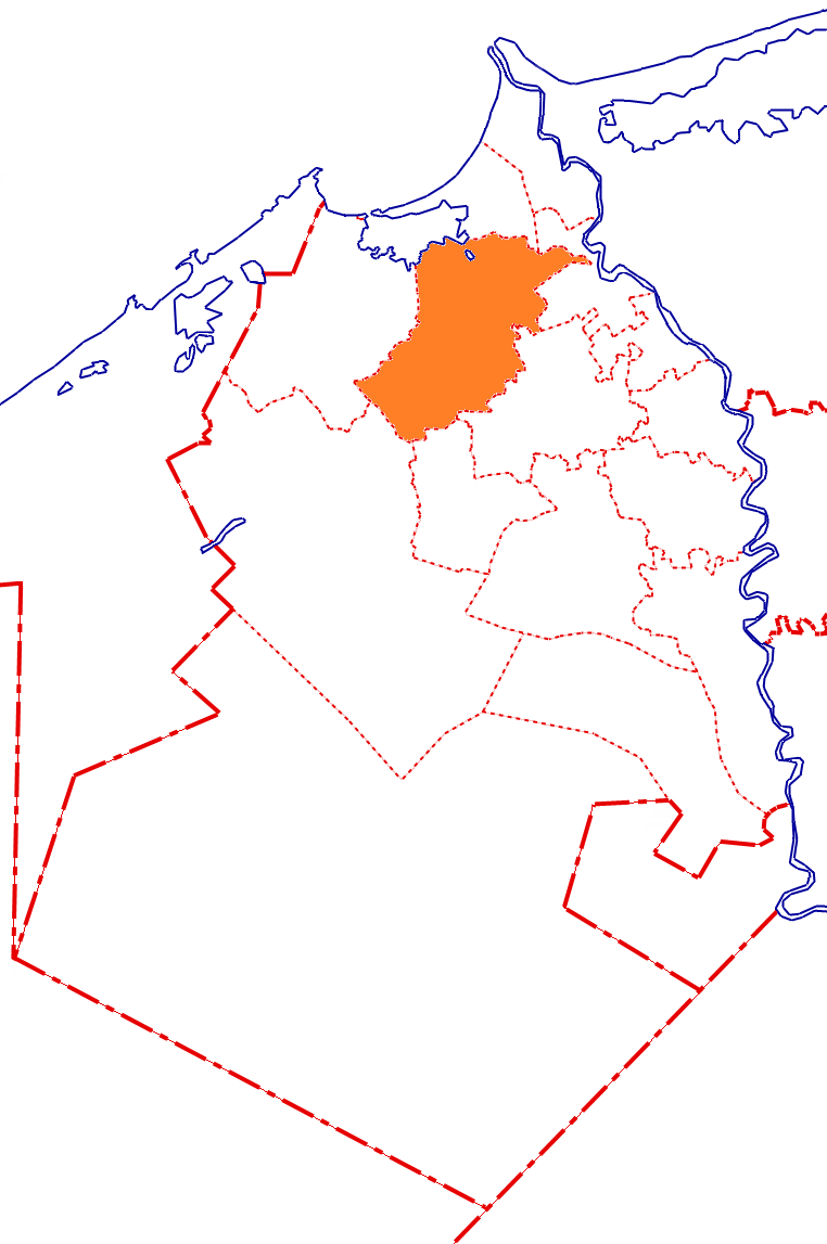 خريطة مركز أبو حمص بالنسبة لمحافظة البحيرة، مصر.